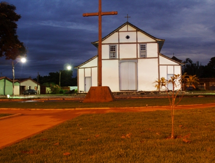 Foto noturna da Igreja Nosso Senhor do Bonfim de Silvânia Goiás